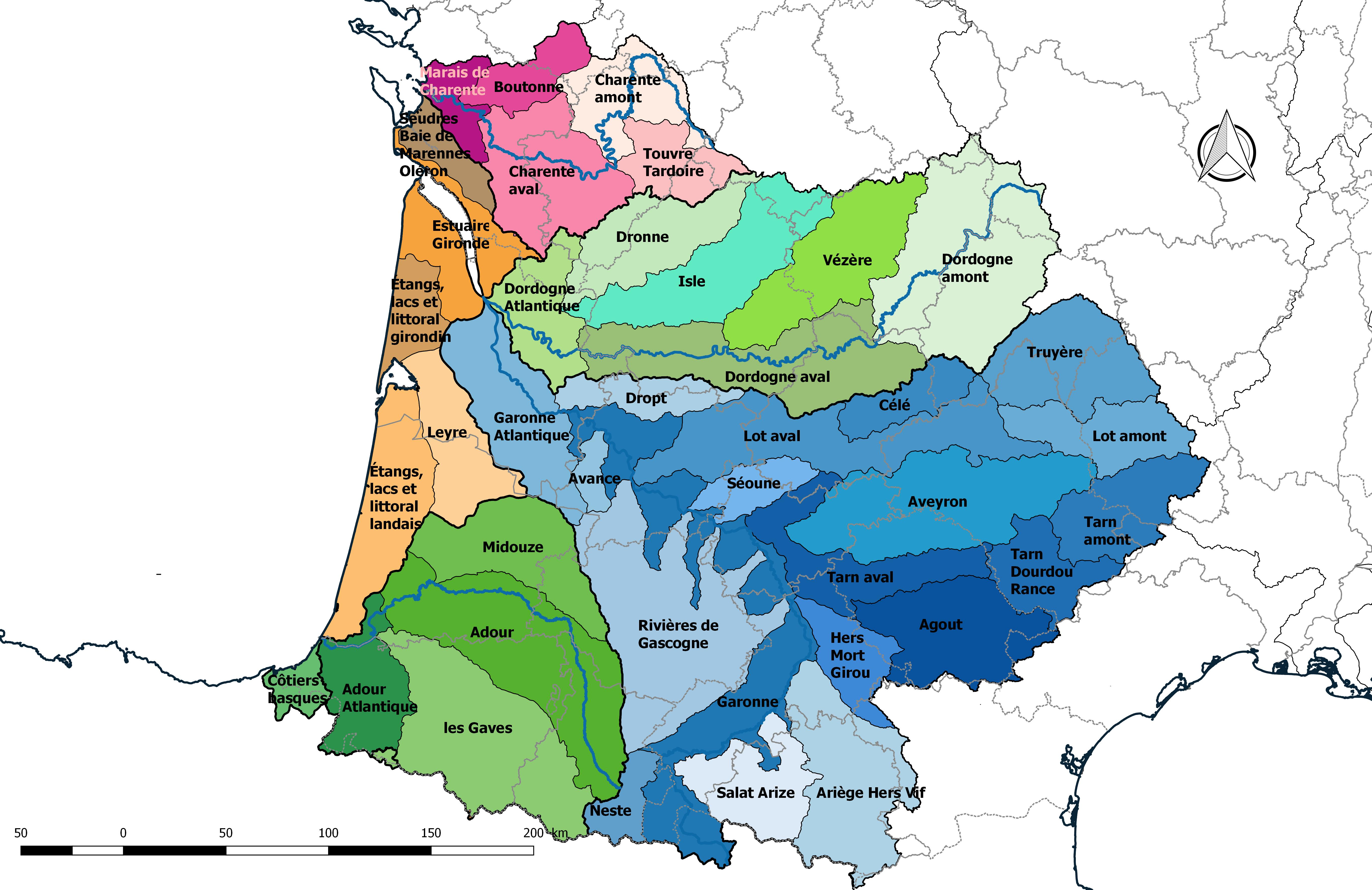 Unités hydrographiques de référence (UHR) du bassin Adour-Garonne (France)